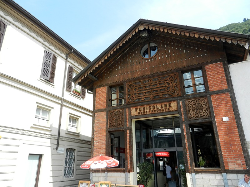 Como - Stazione inferiore della Funicolare per Brunate